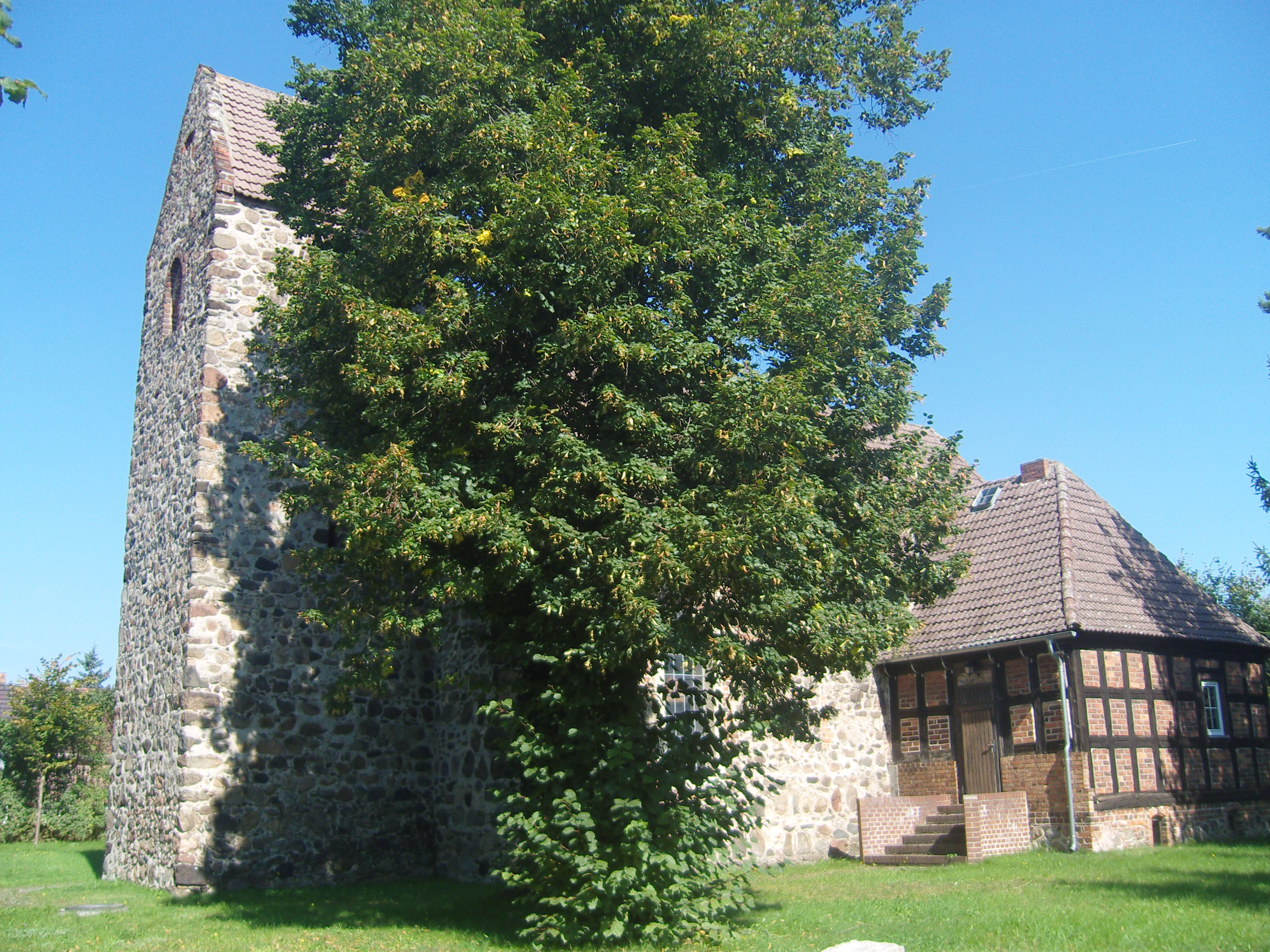 Denkmalgeschützte Kirche in Lipten